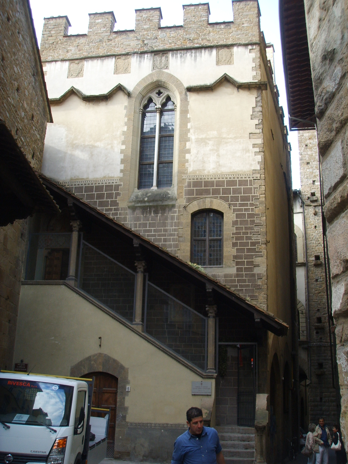 Palagio di parte guefa